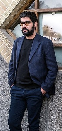 رضا ثروتی در مراسم تشییع پیکر مجید بهرامی